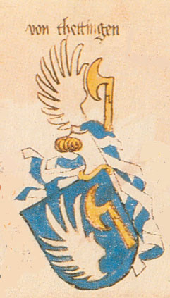 Ingeram-Codex der ehemaligen Bibliothek Cotta von thettingen freigestellt aus